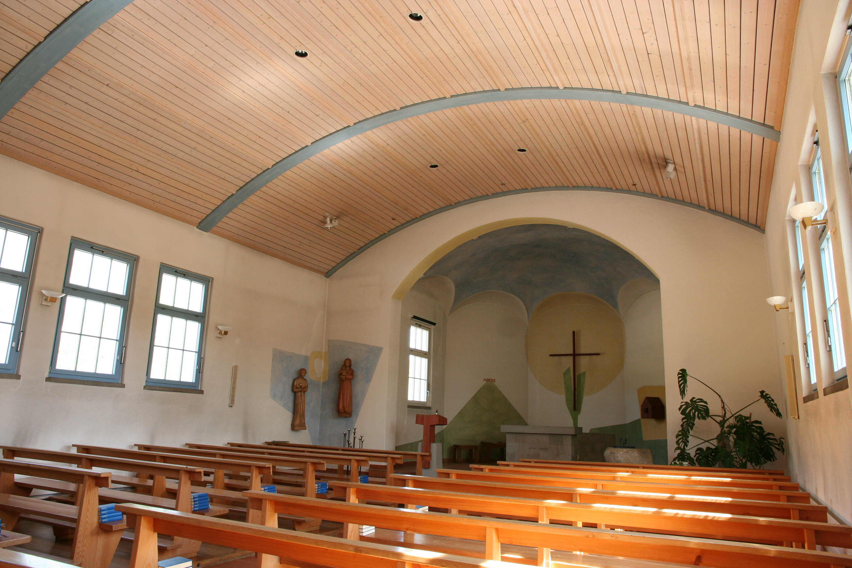 Römisch-katholische Pfarrkirche St. Josef Glattfelden, Gesamtgestaltung und Kunstwerke von Alois Spichtig